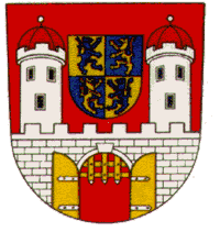 Znak města Dobrovice, převzato z oficiálních stránek města Dobrovice